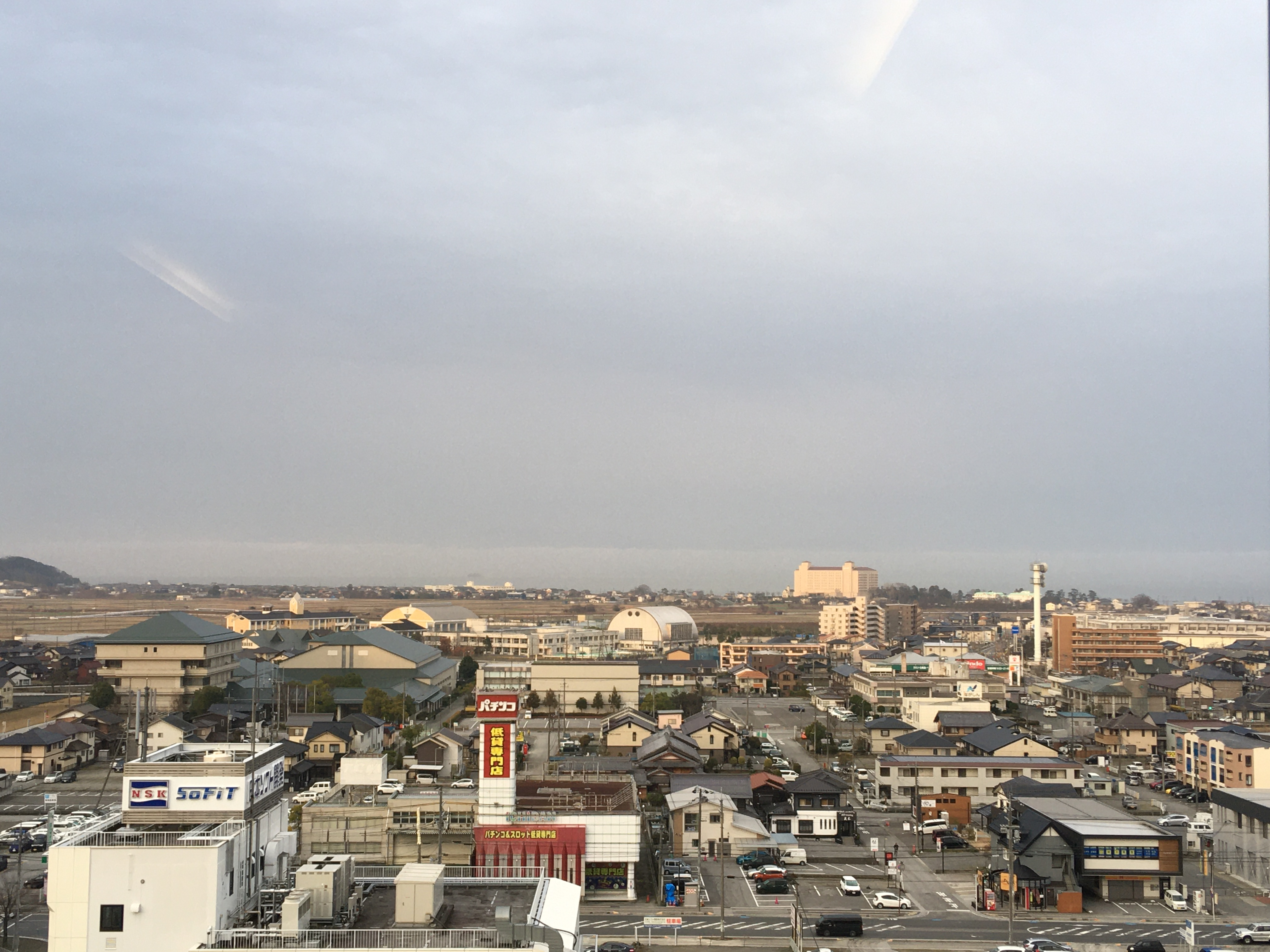 米原東横インより撮影